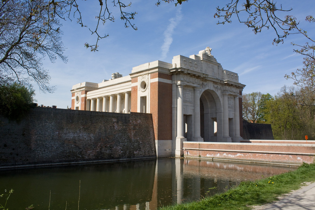 Menensepoort te Ieper